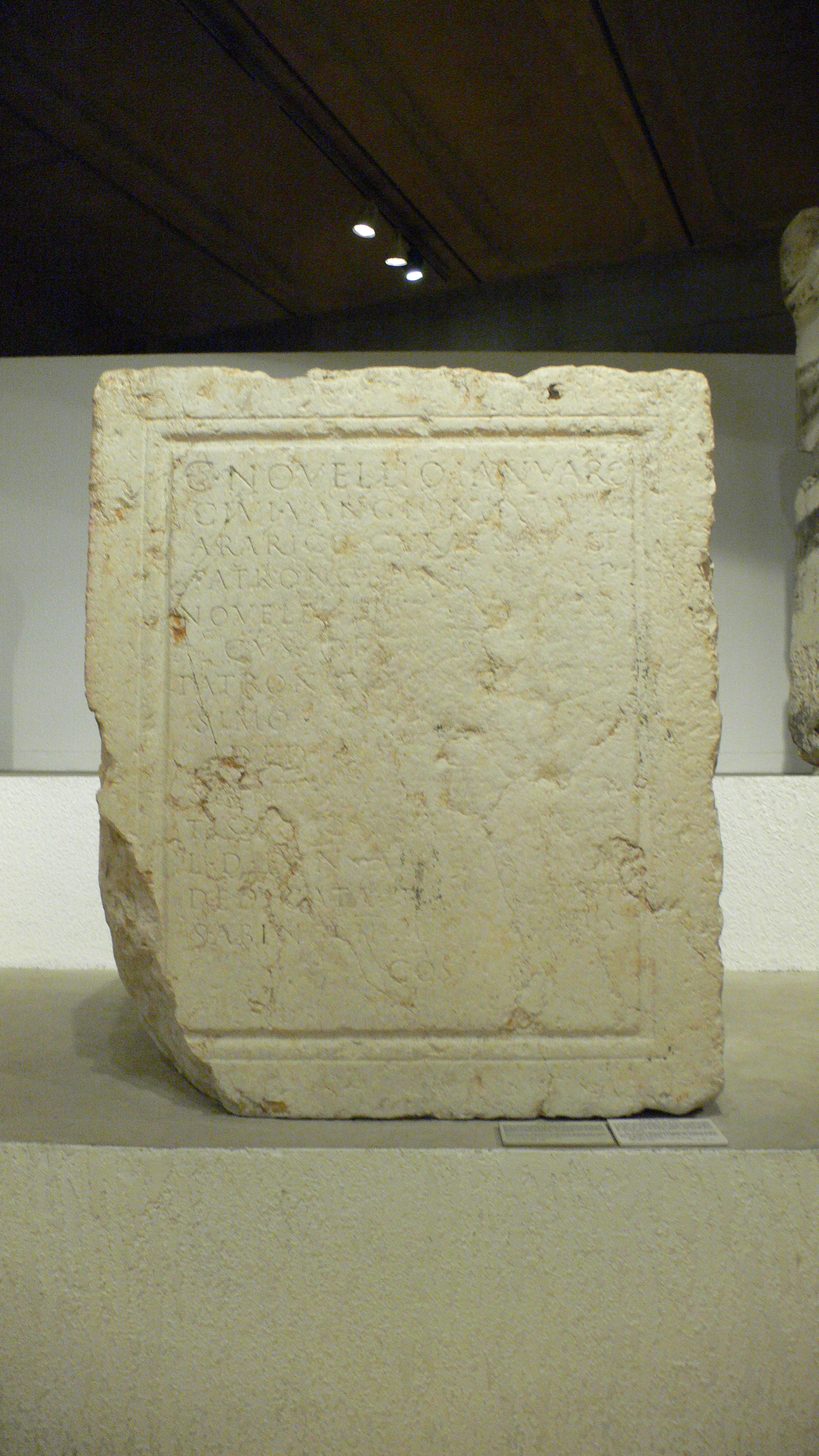 Musée gallo-romain de Fourvière (Lyon). épigraphie trouvée en remploi dans un mur d'écurie de l'hôtel des Trois-Ambassadeurs en octobre 1873, quai de Bondy. Haut. 1.05m, larg. 64cm : C(aio) Novellio Ianuario, civi Vangioni, nautae / Ararico, curatori et / patrono eiusdem corp(oris), NovelliFaus[tus et Sote]ri/cus de se[merenti] / patrono in[dul]gentis/simo, C[uius statu]ae/ dedica[tione dedit / sportulas u[niversis nau]tis praesent[ibus] (denarios) III. / L(ocus) d(atus) d(ecreto) n(autarum) Arari[cor]um. / Dedicata p[ridie - - - sep]t(embres), / Sabino II [et Anullin]o / co[n]s[ulibus]. : A Caius Novellius Januarius, de la cité des Vangions, batelier de la Saône, curateur et patron de la corporation Novellius Faustus et Novellius Sotericus ont élevé à leur méritant et très généreux patron cette statue, pour la dédicace de laquelle, il a donné, à titre sportule, à tous les bateliers présents, 3 deniers. L'emplacement a été donné par décret des bateliers de la Saône. La dédicace a eu lieu la veille des (calendes, nones ou ides ?) de septembre, sous d'Anullinus. Datation : 216 après J.C. (Carte archéologique de la Gaule-69 Lyon, p. 471)